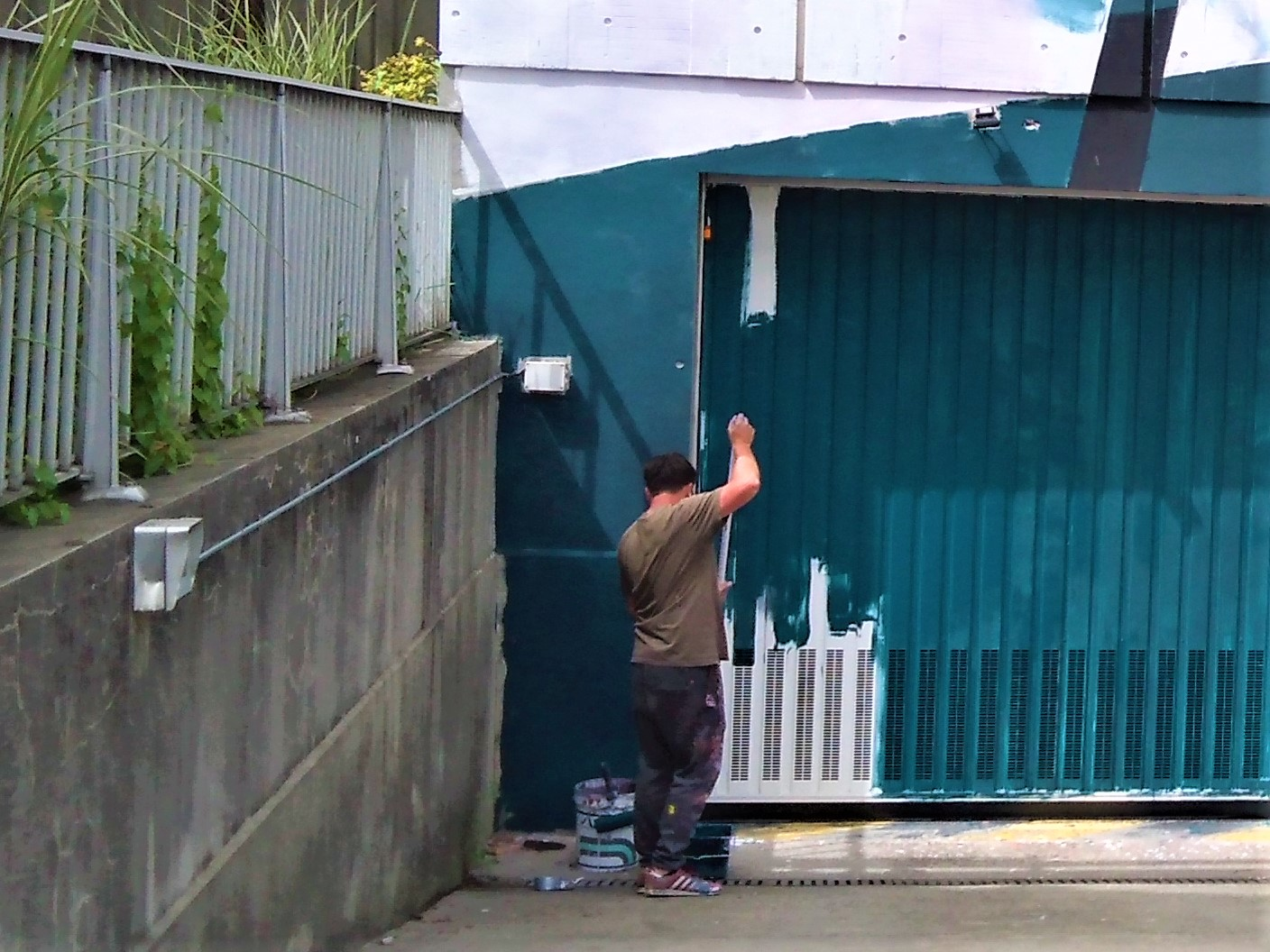 Robert Proch au festival d'art street de Grenoble Alpes